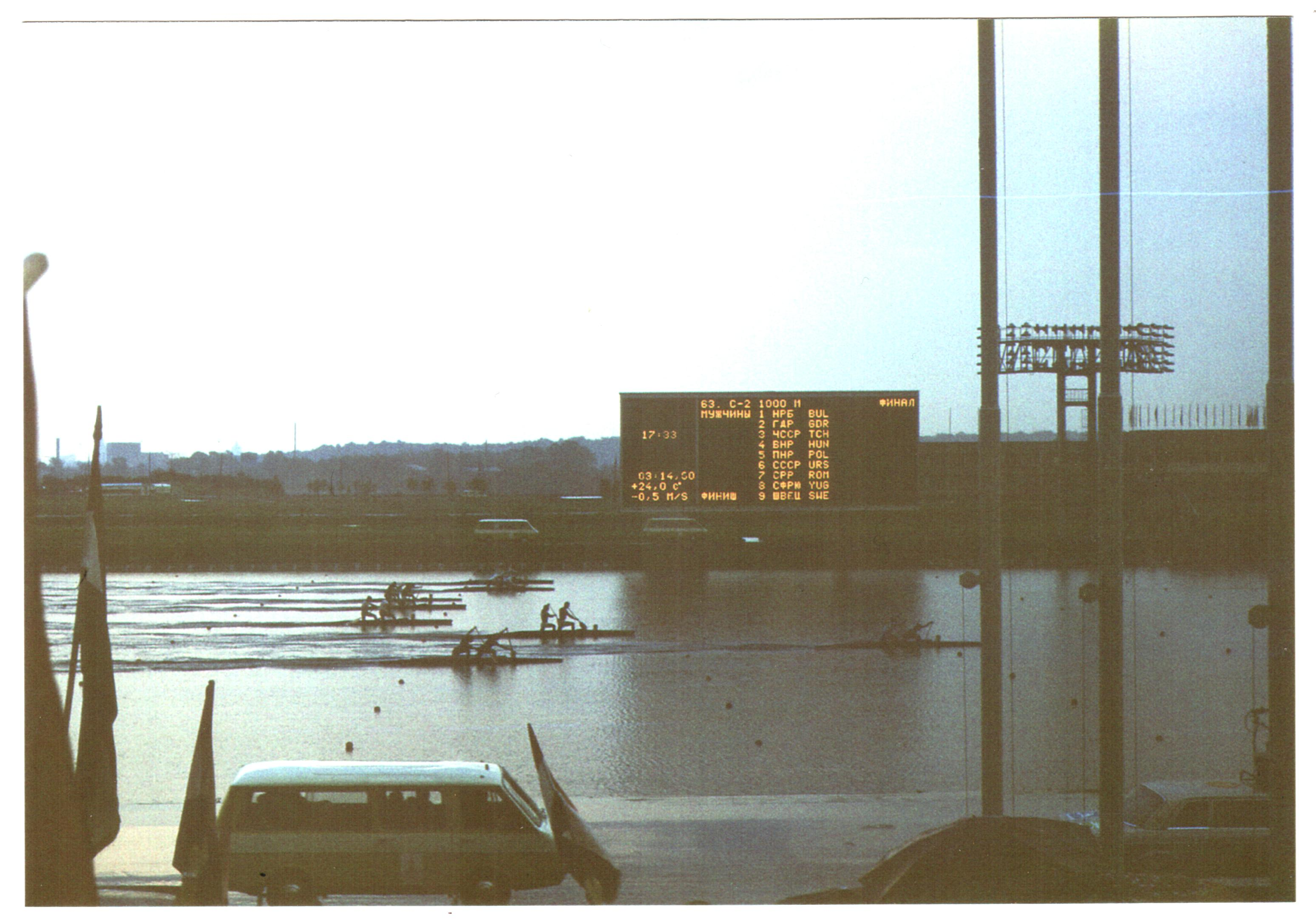 Moscow Olympic Games, 1980. Live in Moscow, in the Summer, 1980. I travelled with a Hungarian group of fans, from Budapest, Hungary. Published under Creative Commons in the Metapolisz DVD line.